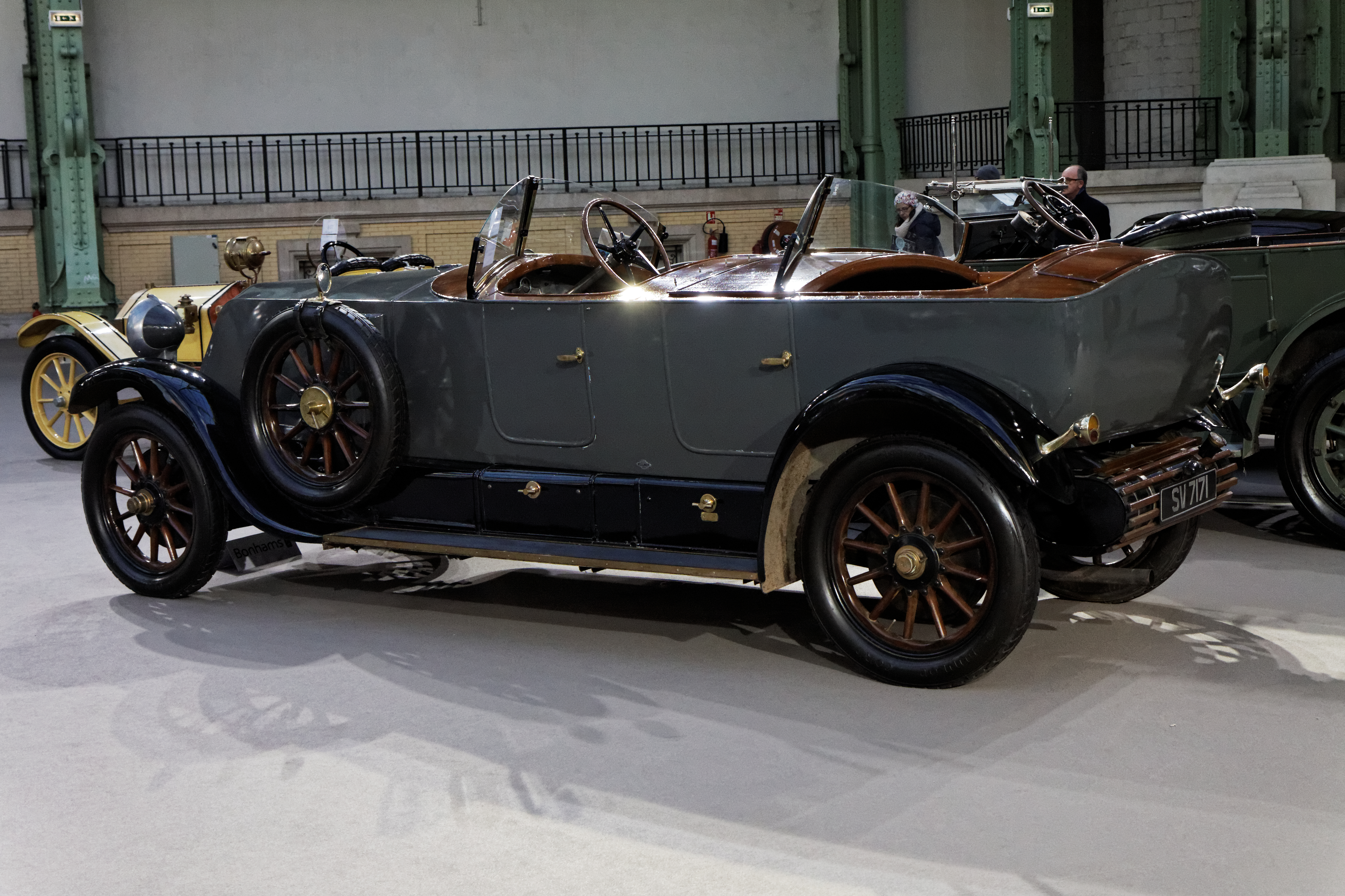 Une Renault six cylindres torpédo double phaëton de 1927.